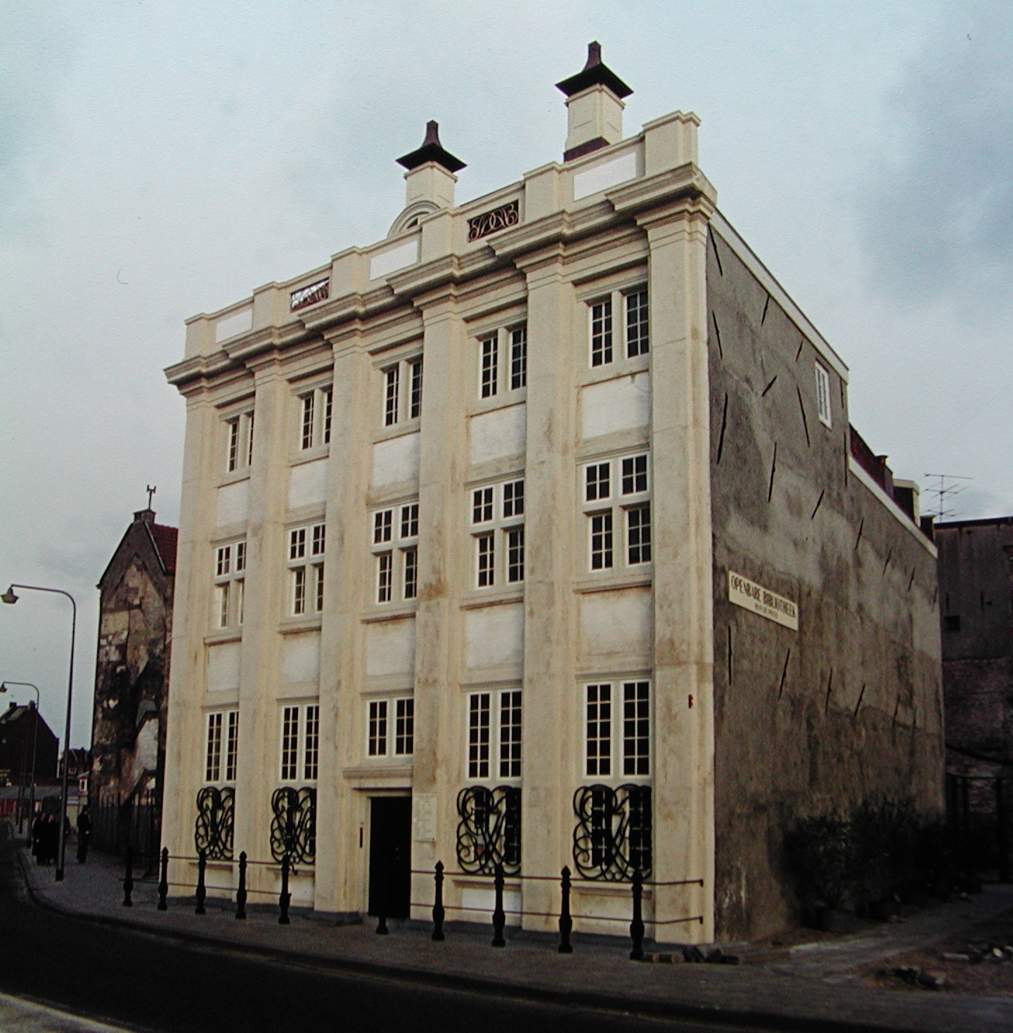 Het Pintohuis foto ong. 1975, auteur P.H.Louw, eigen werk, vrij voor gebruik Categorie:Afbeelding Amsterdam